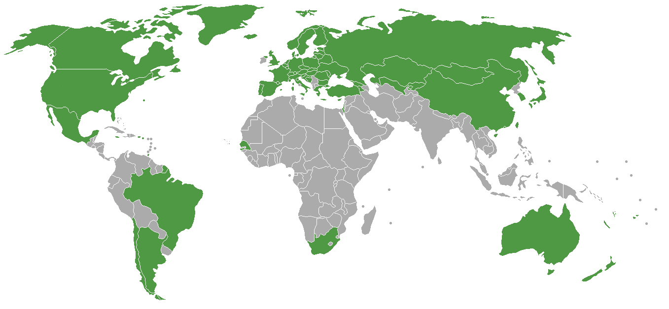 Carte des pays participants aux Jeux olympiques d'hiver de Lillehammer en 1994.